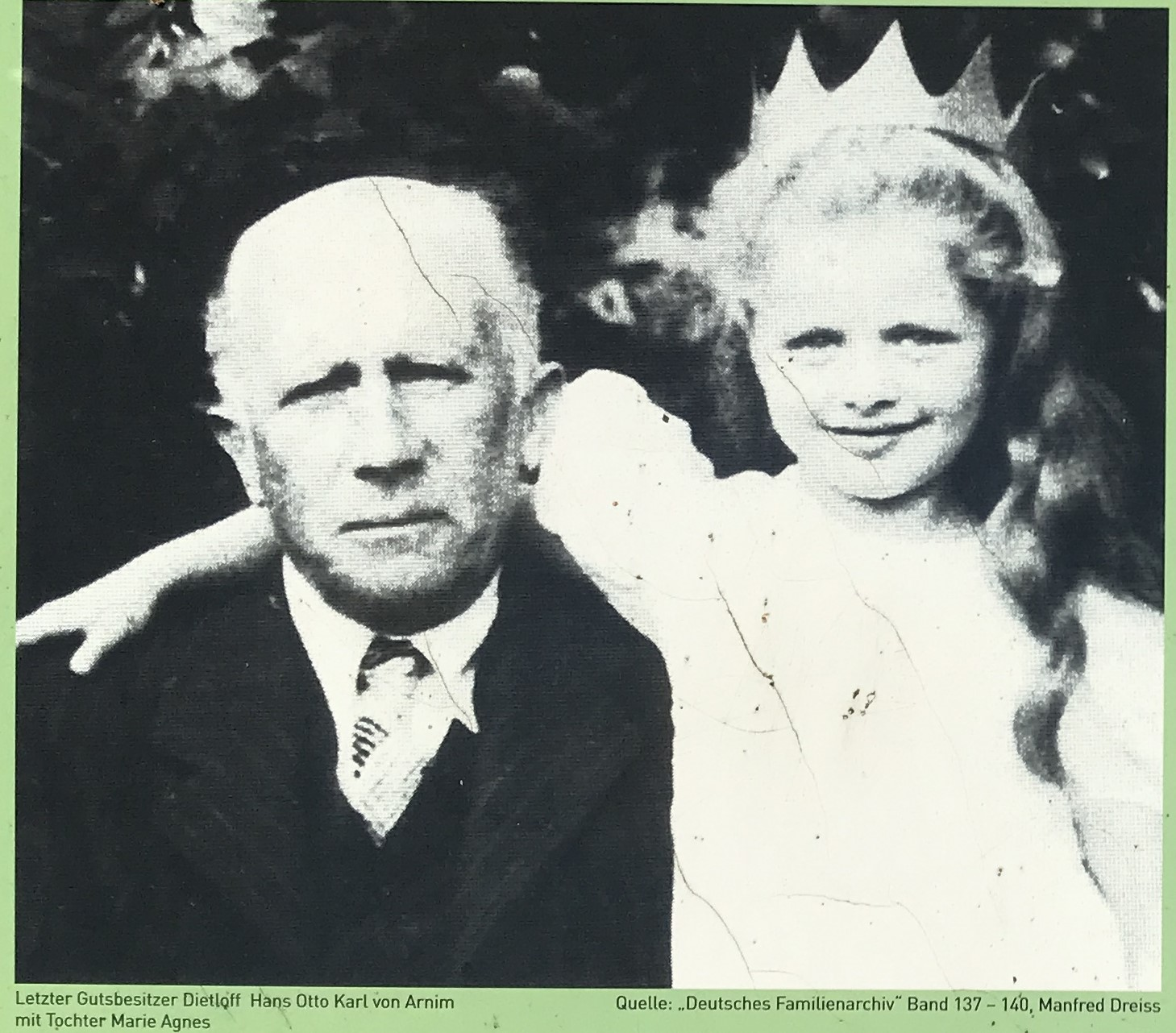 Dietloff von Arnim, letzter Gutsbesitzer von Güterberg, einem Ortsteil der Gemeinde Uckerland in Brandenburg. Die Aufnahme stammt von einer öffentlich zugänglichen Informationstafel des Landkreises Uckerland in Zusammenarbeit mit den beteiligten Gemeinden und steht am Gutshaus Güterberg in Uckerland.